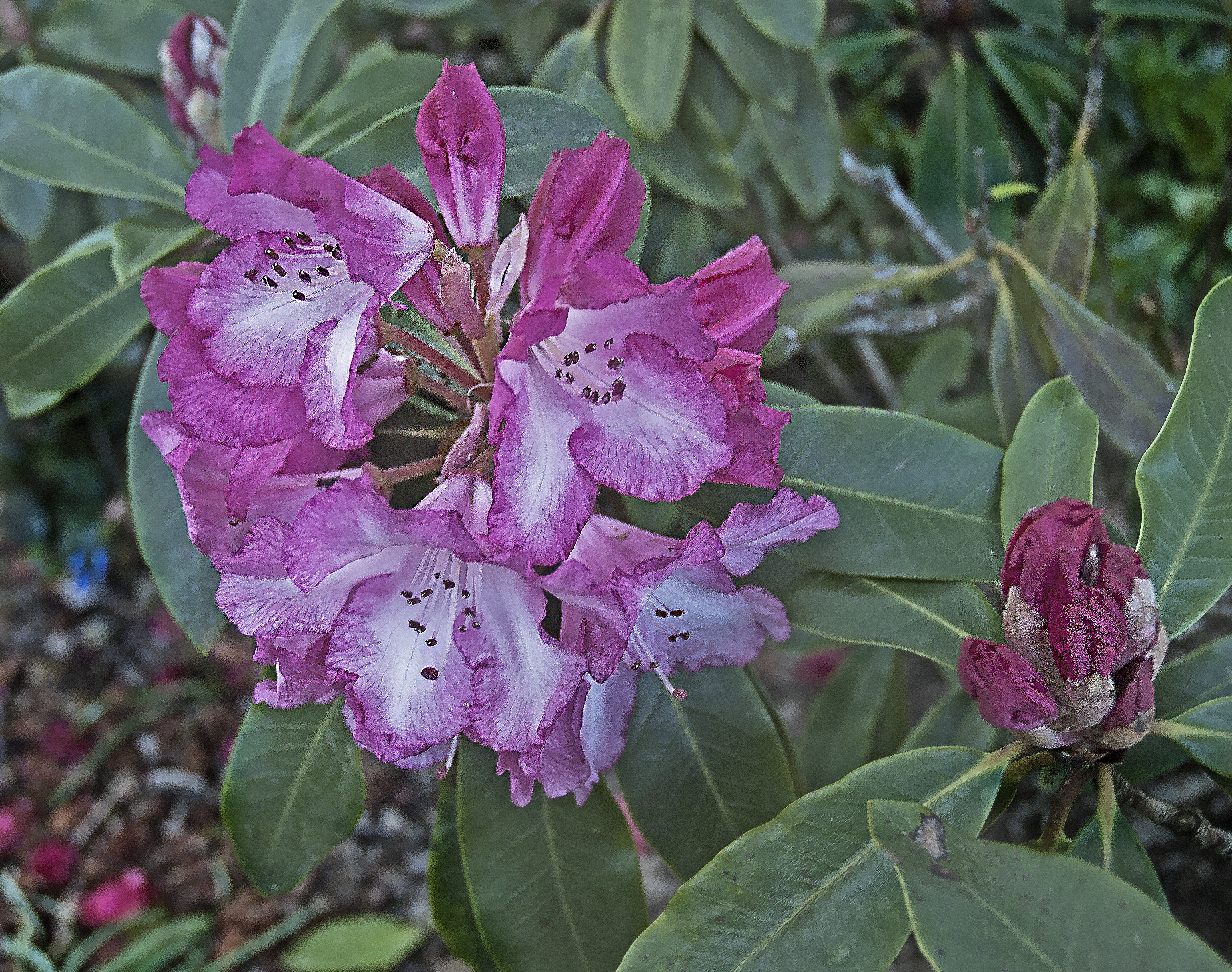 Wisley Garden